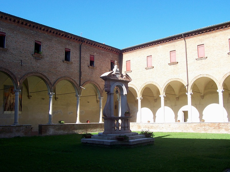 Ferrara - Chiostro della Baslica di S. Giorgio fuori le Mura